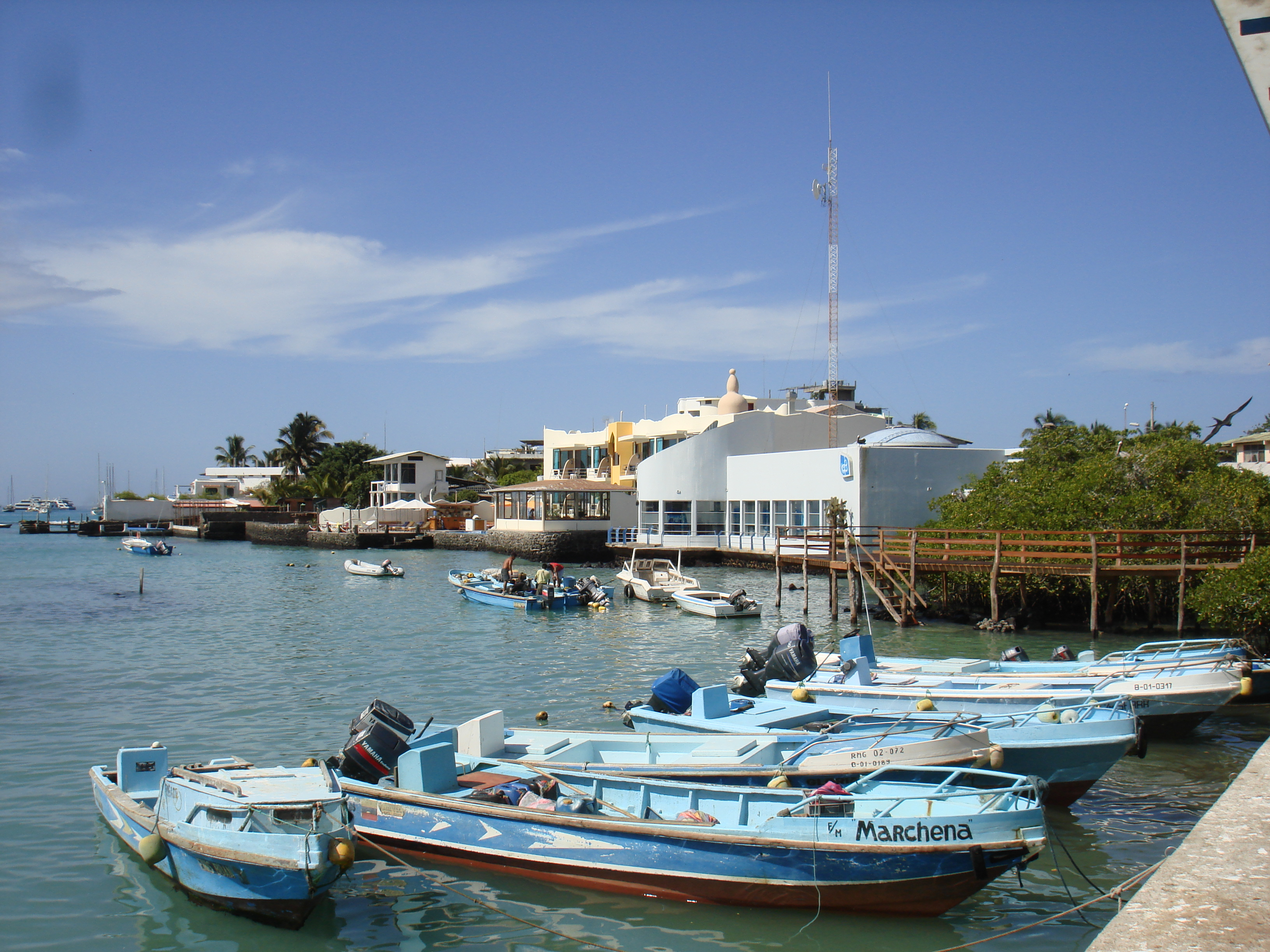 Puerto Ayora Harbor